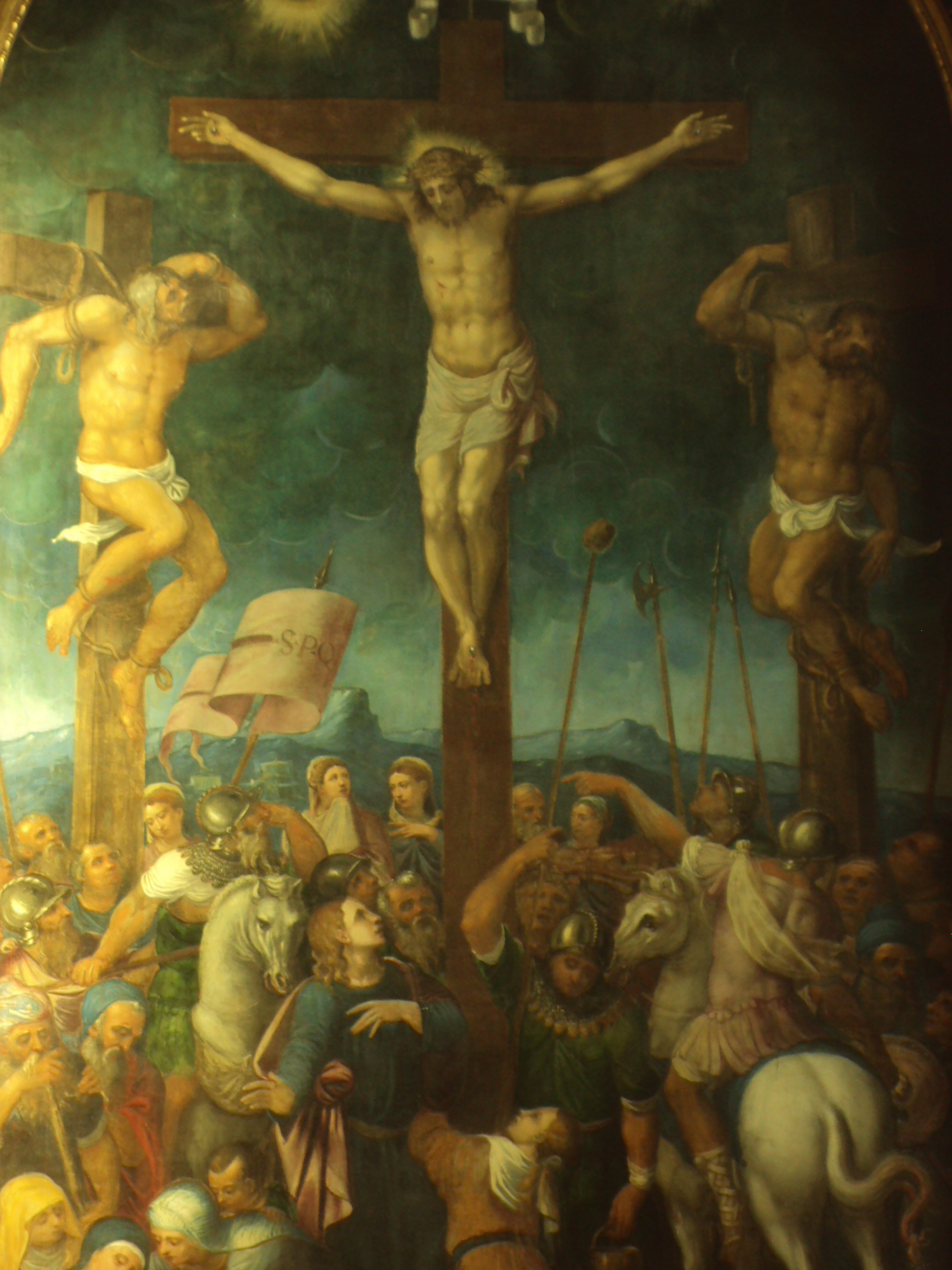 Bodzentyn kościół - obraz Chrystus na krzyżu w ołtarzu głównym